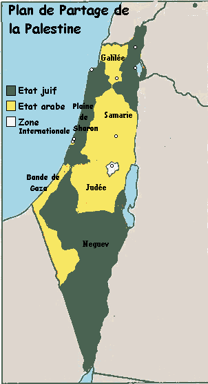 Carte du Plan de Partage de la Palestine proposé par l'UNSCOP et votée par l'Assemblée Générale de l'ONU le 29 novembre 1947.